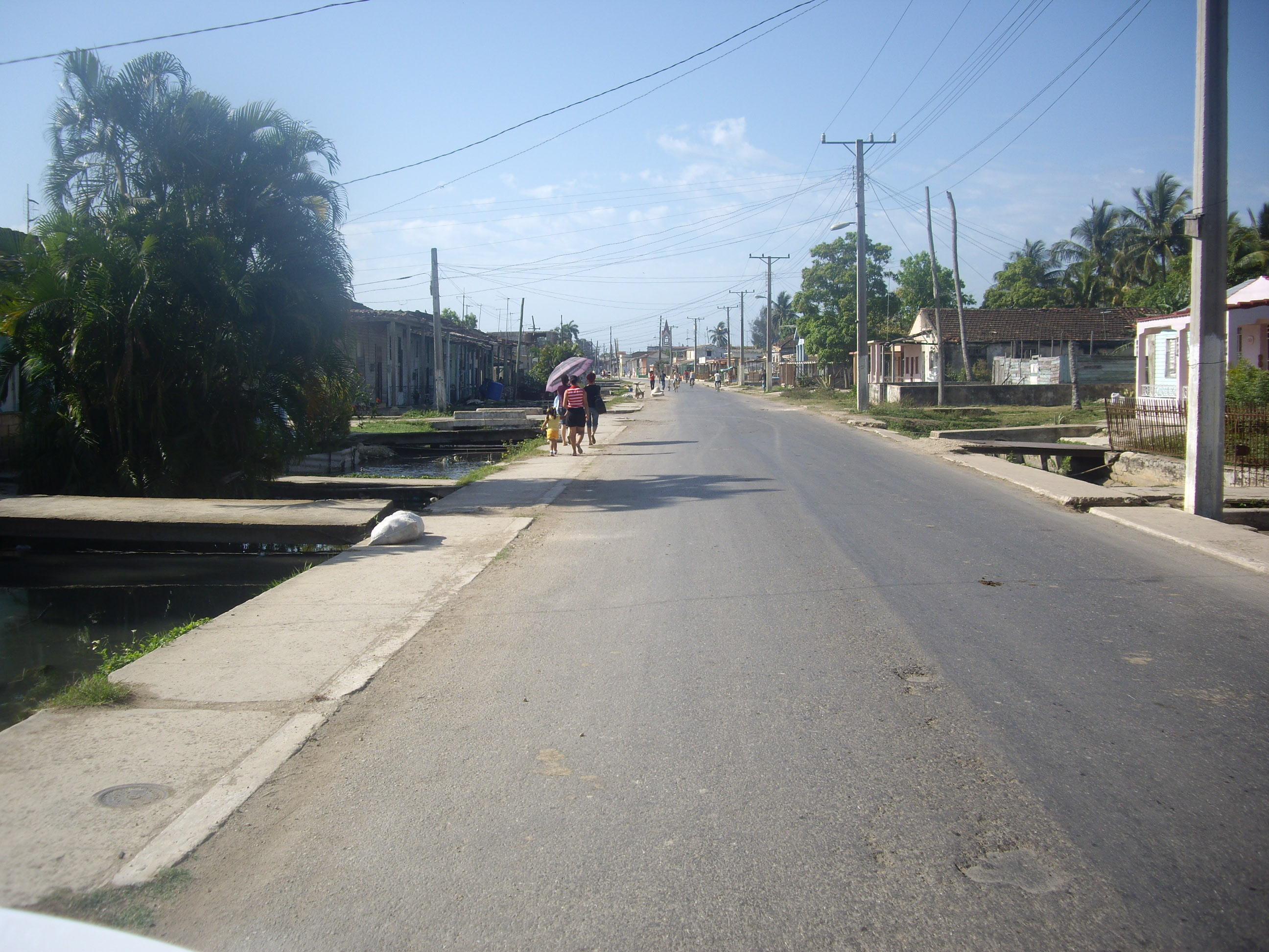 Carrer de Surgidero de Batabanó